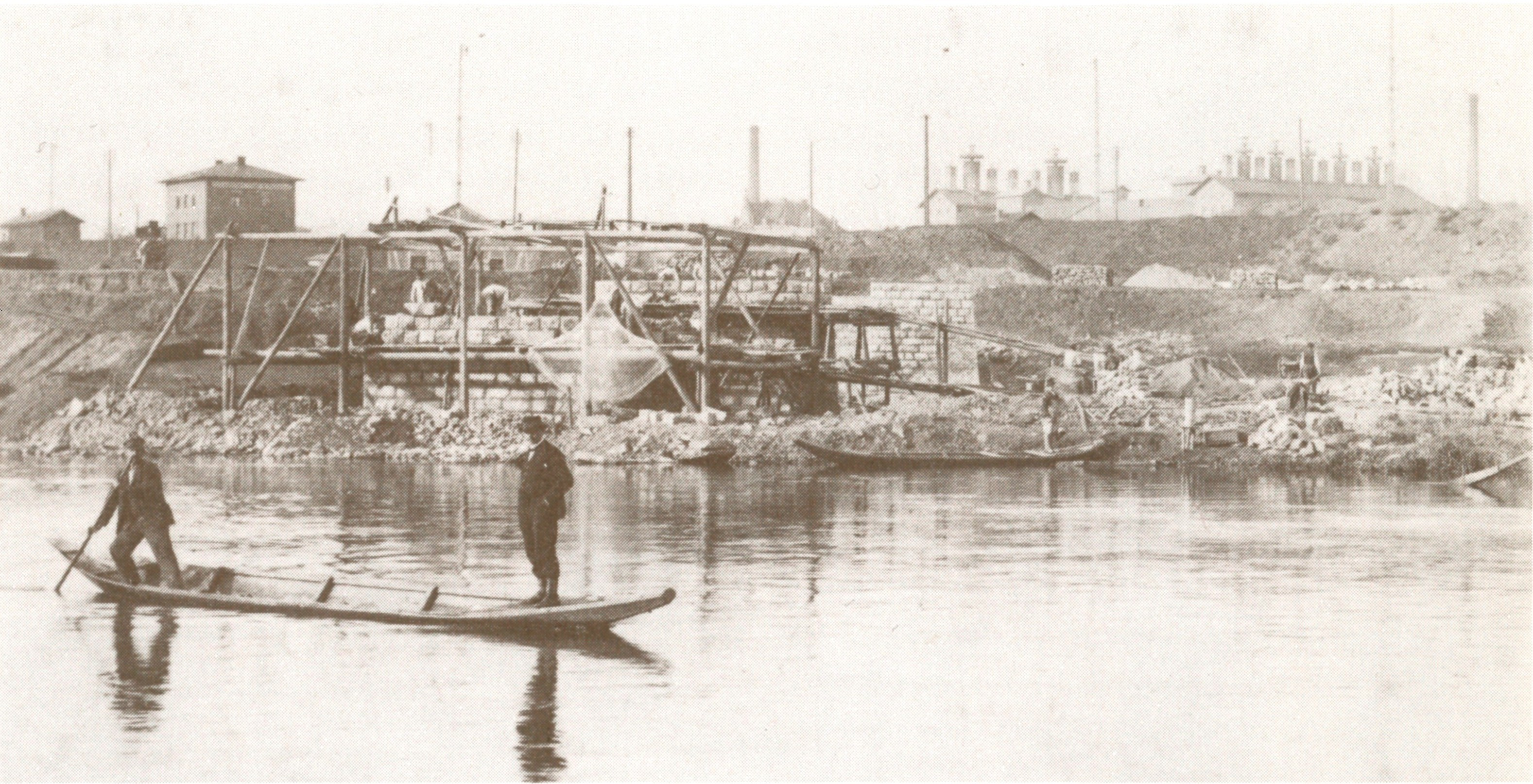 Schweinfurt Fotografie 1903: Bau der sogenannten Gerzolzhöfer Brücke über den Main, im Hintergrund die Ultramarinfabrik (links) und die Malzfabrik (rechts).